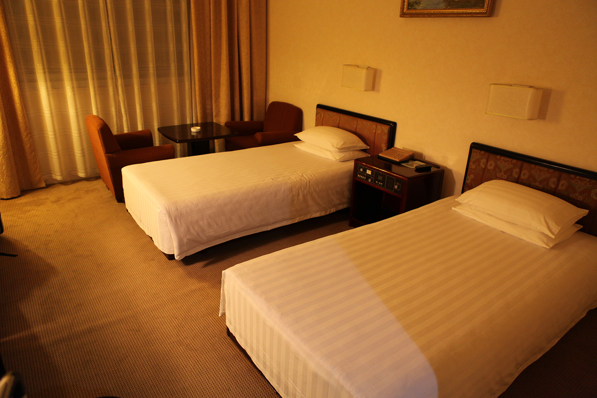 Room in Yanggakdo International Hotel, Pyongyang.